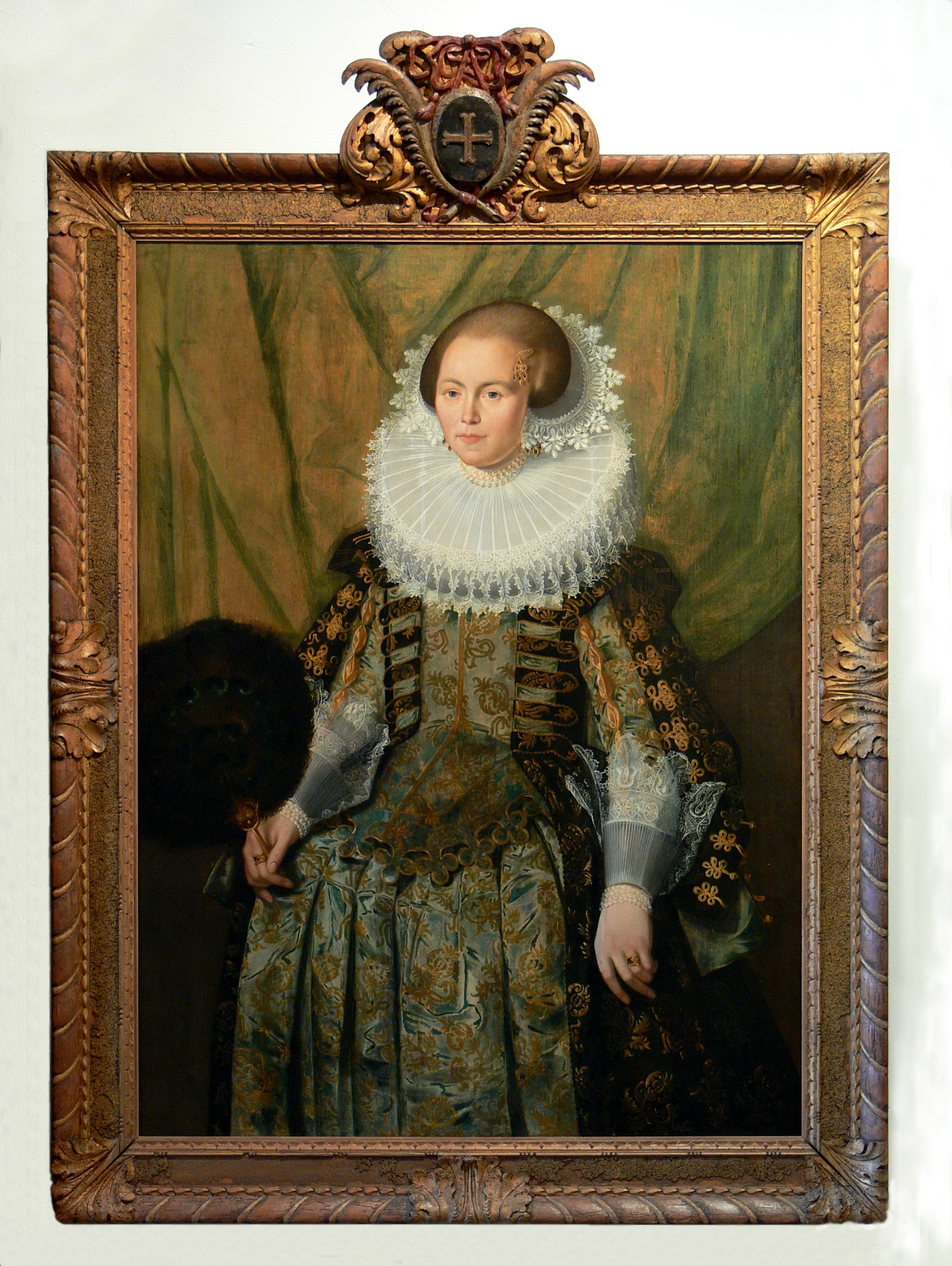 Potret van Eva Ment (1606-1658) echtgenote van J.P. Coen (1587-1629) en stichter van de stad Batavia Potret van Eva Ment (1606-1658) echtgenote van J.P. Coen (1587-1629) en stichter van de stad Batavia